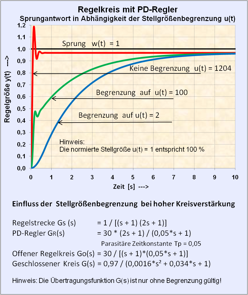 Sprungantwort eines Regelkreises mit Stellgrößenbegrenzung.